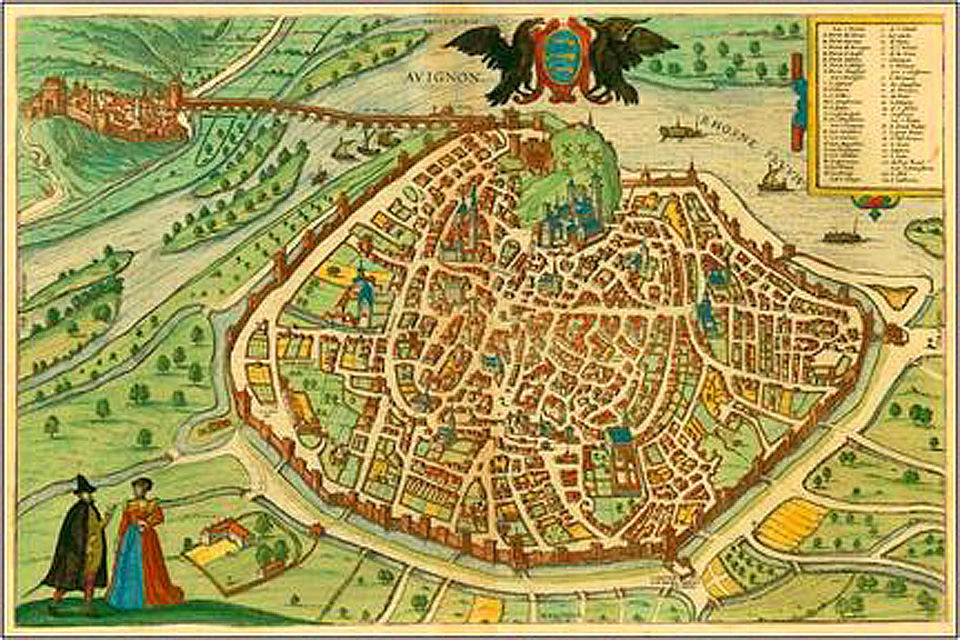 Carte aux personnages montrant Avignon ceint de ses remparts au XVIe s